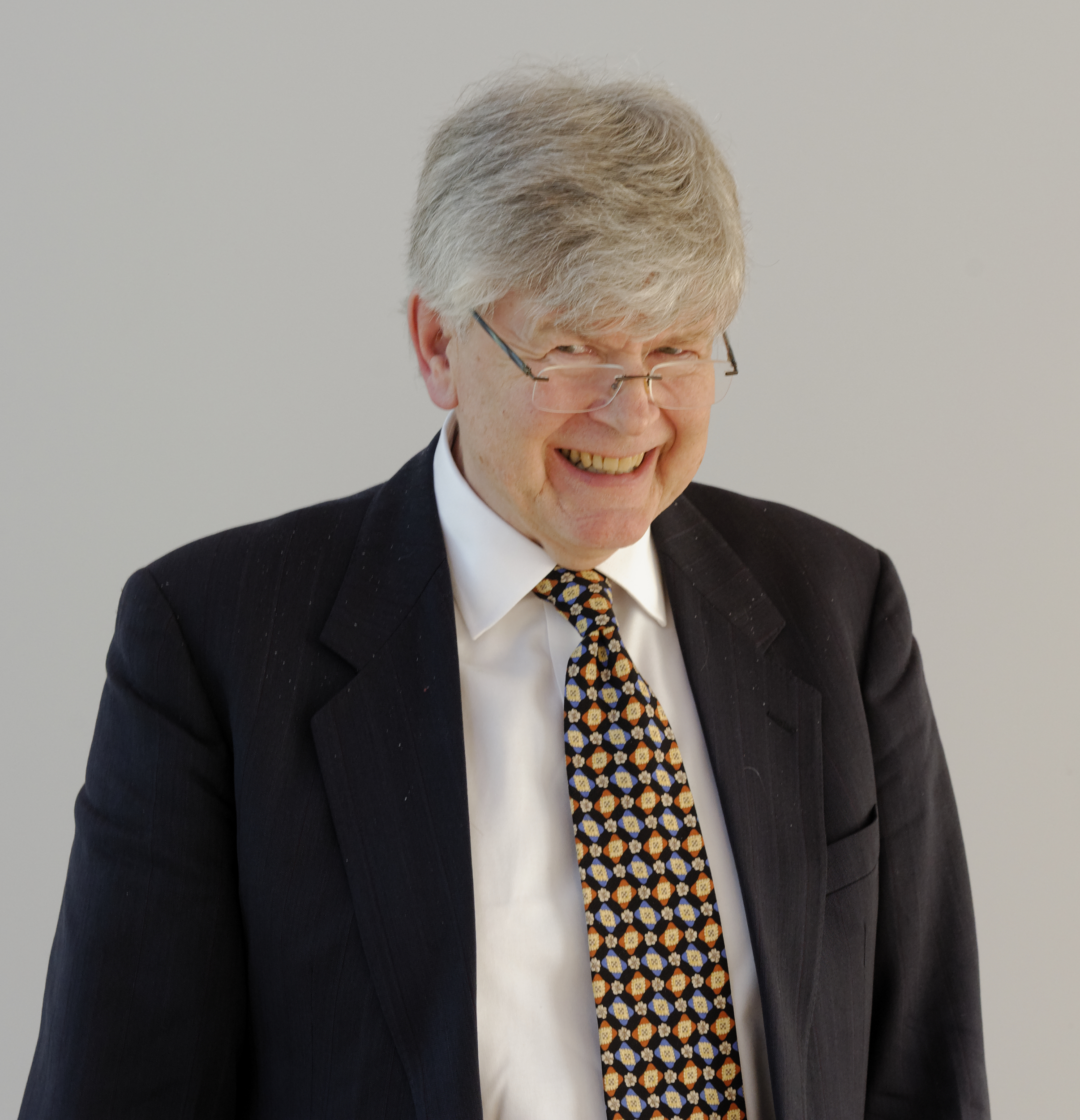 Rotary Klavierwettbewerb 2013